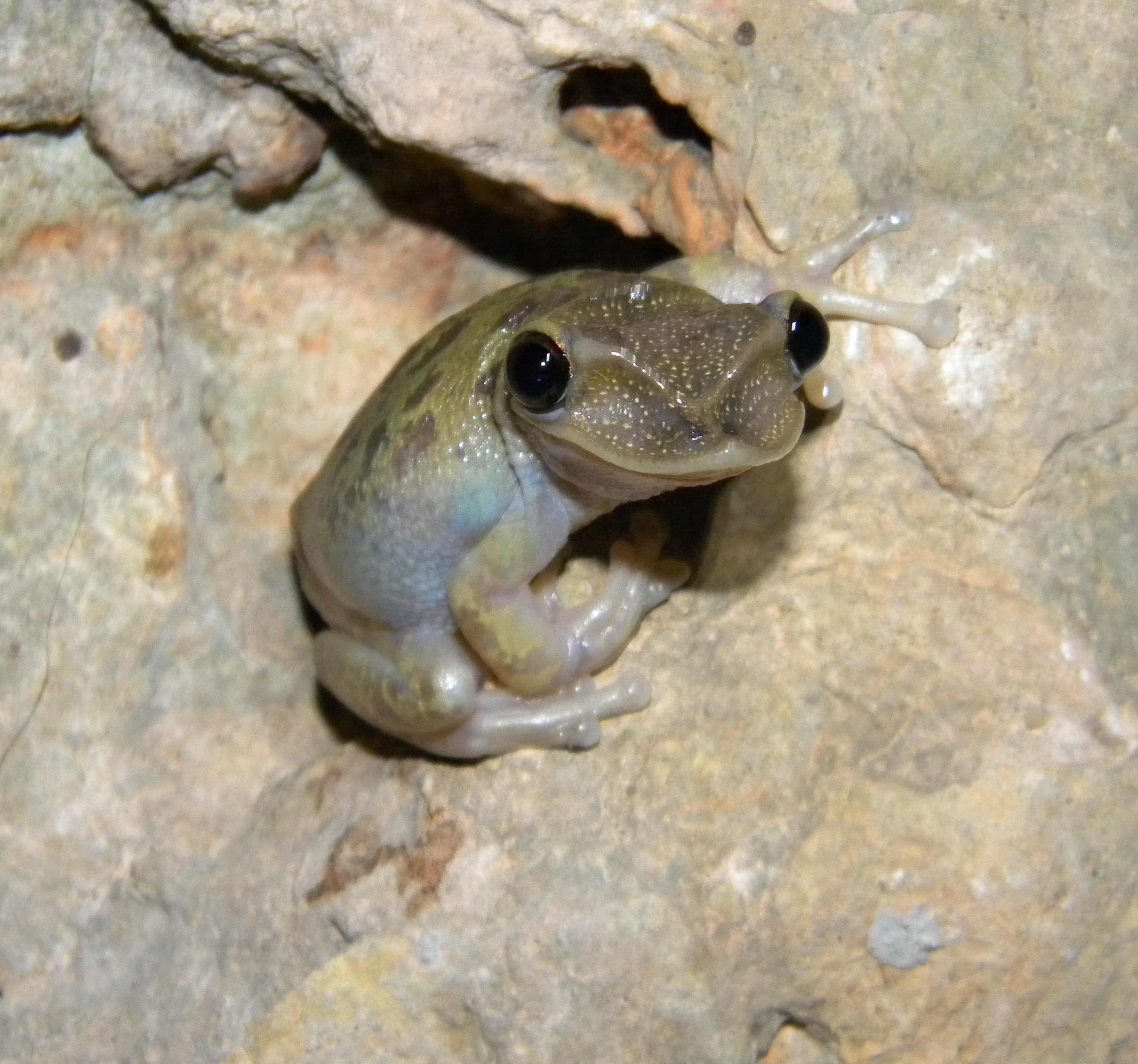 Yucatan casque-headed tree frog (Tiprion petasatus) Uxmal, Yucatan, Mexico